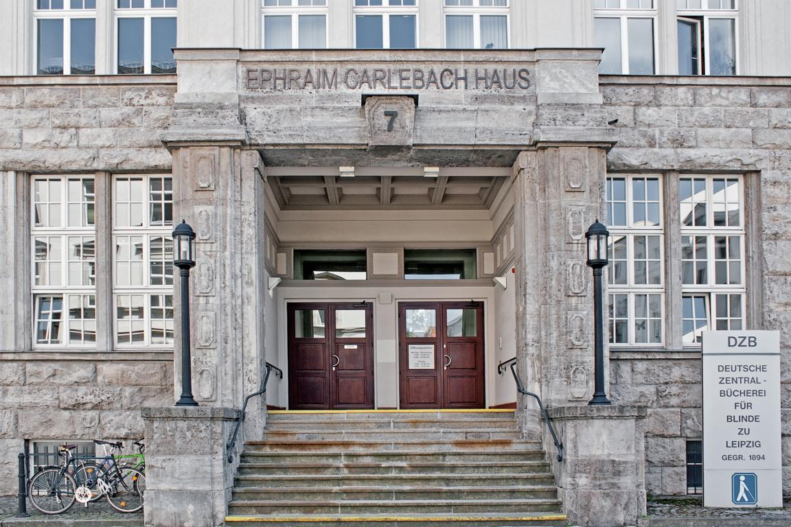 Haupteingang DZB Leipzig